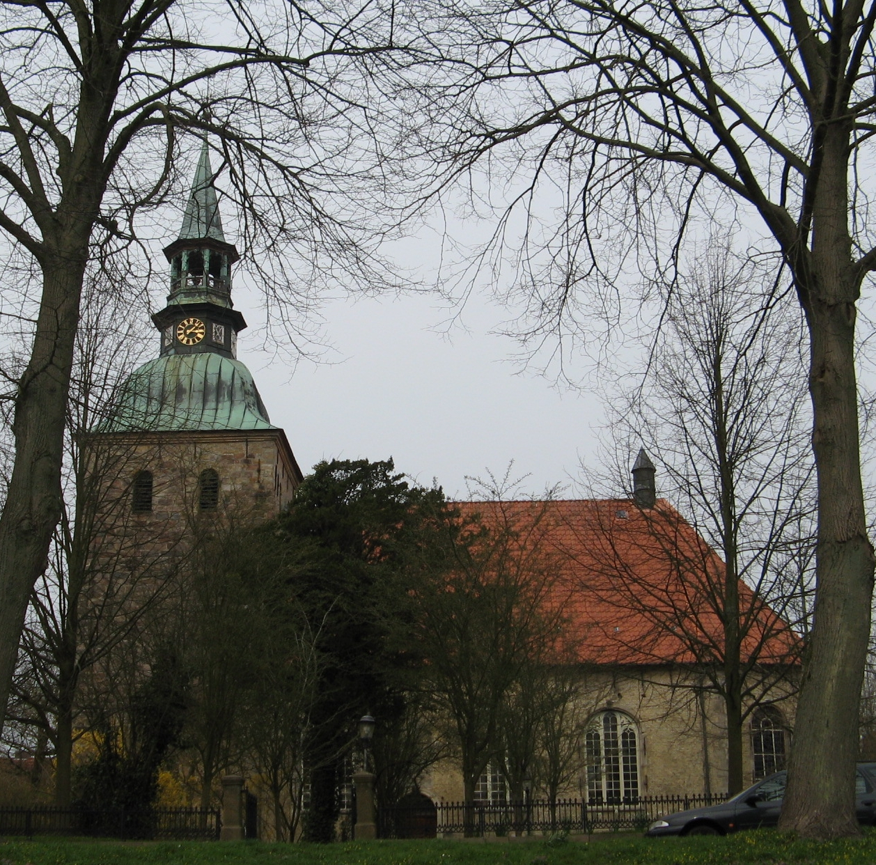 lutheran saint christopherus church in Friedrichstadt Author: Dirk Ingo Franke